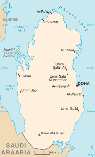 Katari kaart